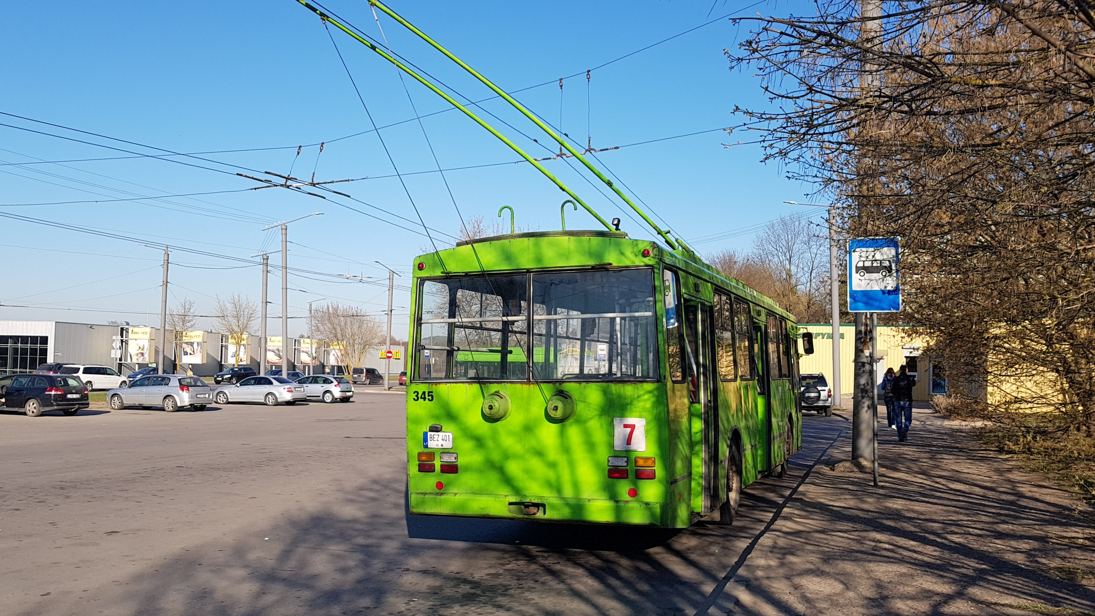 Škoda 14Tr Kaniūkain päätepysäkillä Kaunaksessa, Liettuassa